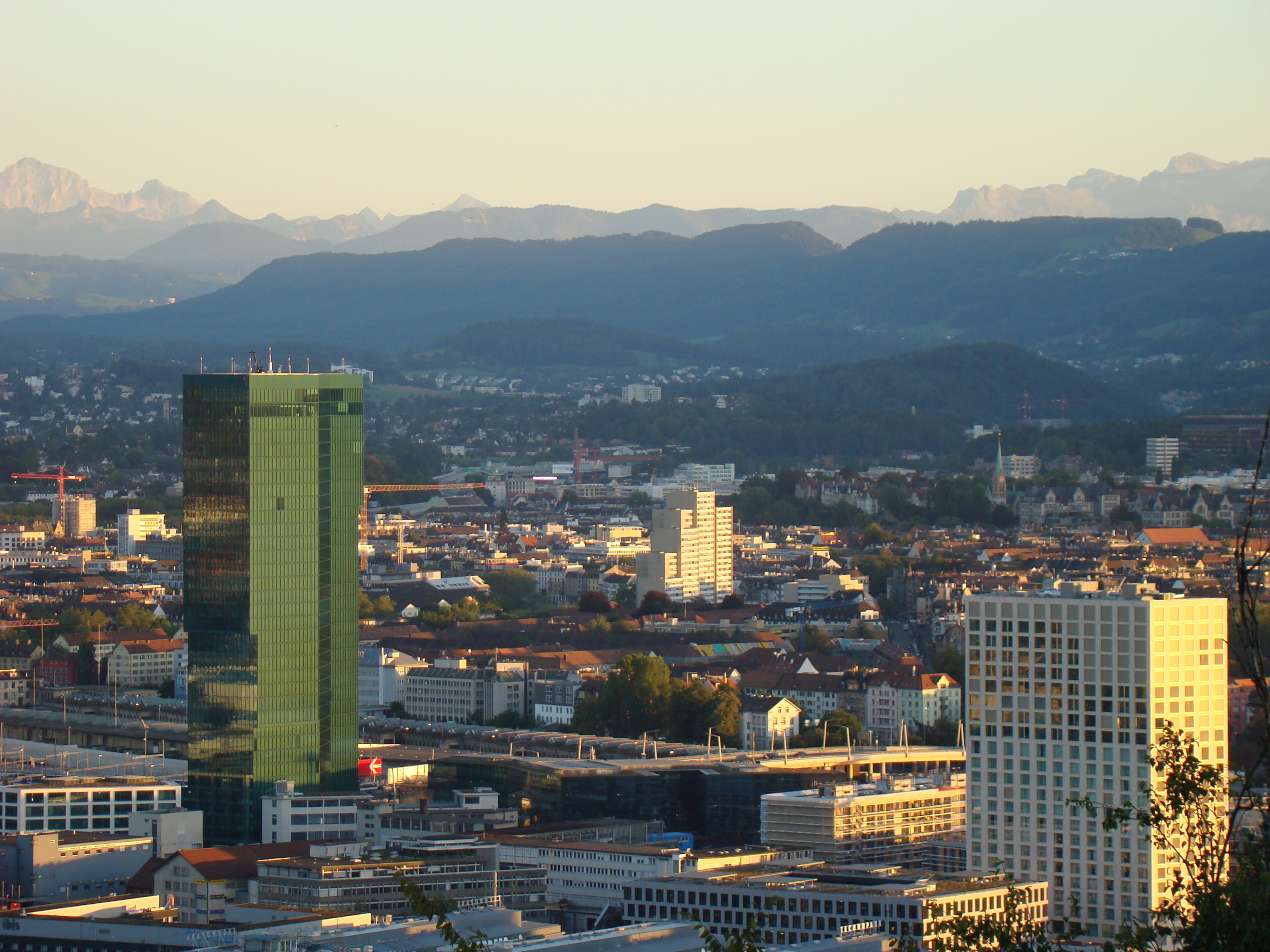 Zürich West